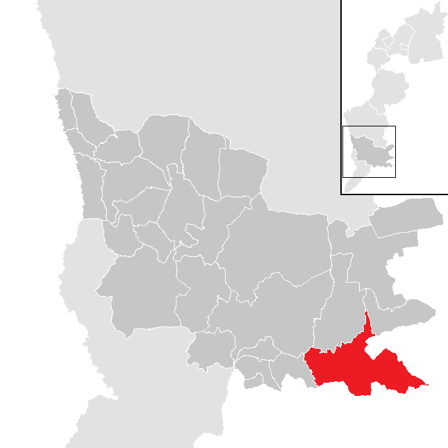 Bezirk Güssing